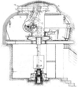 Instrukcja wieży